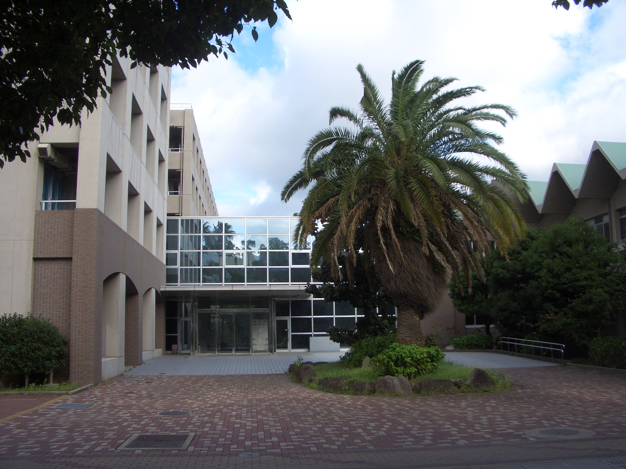 長崎大学薬学部棟